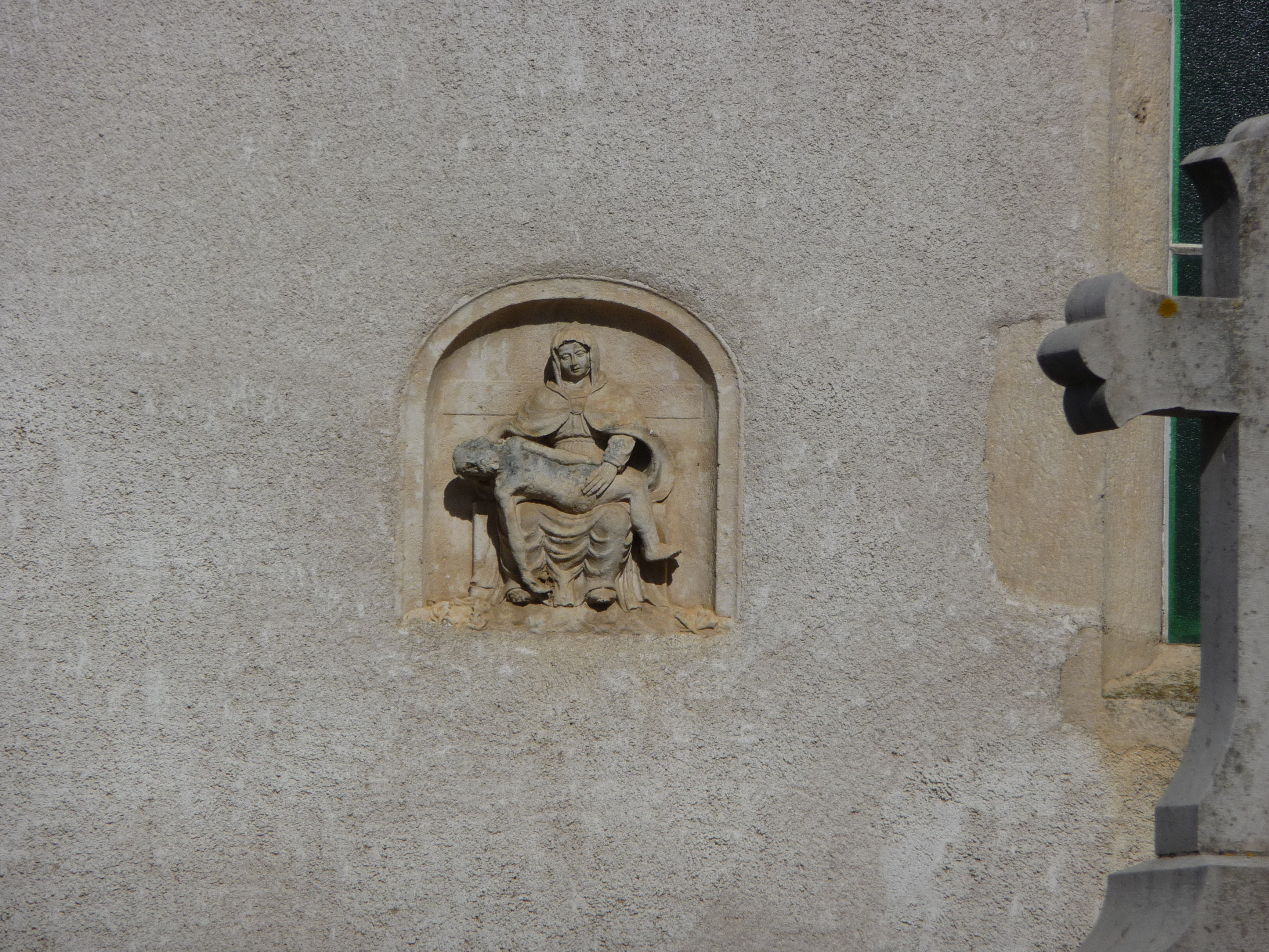 Descente de croix, le Christ sur les genoux de la vierge. Sculpture incluse dans le mur côté Sud de l'église